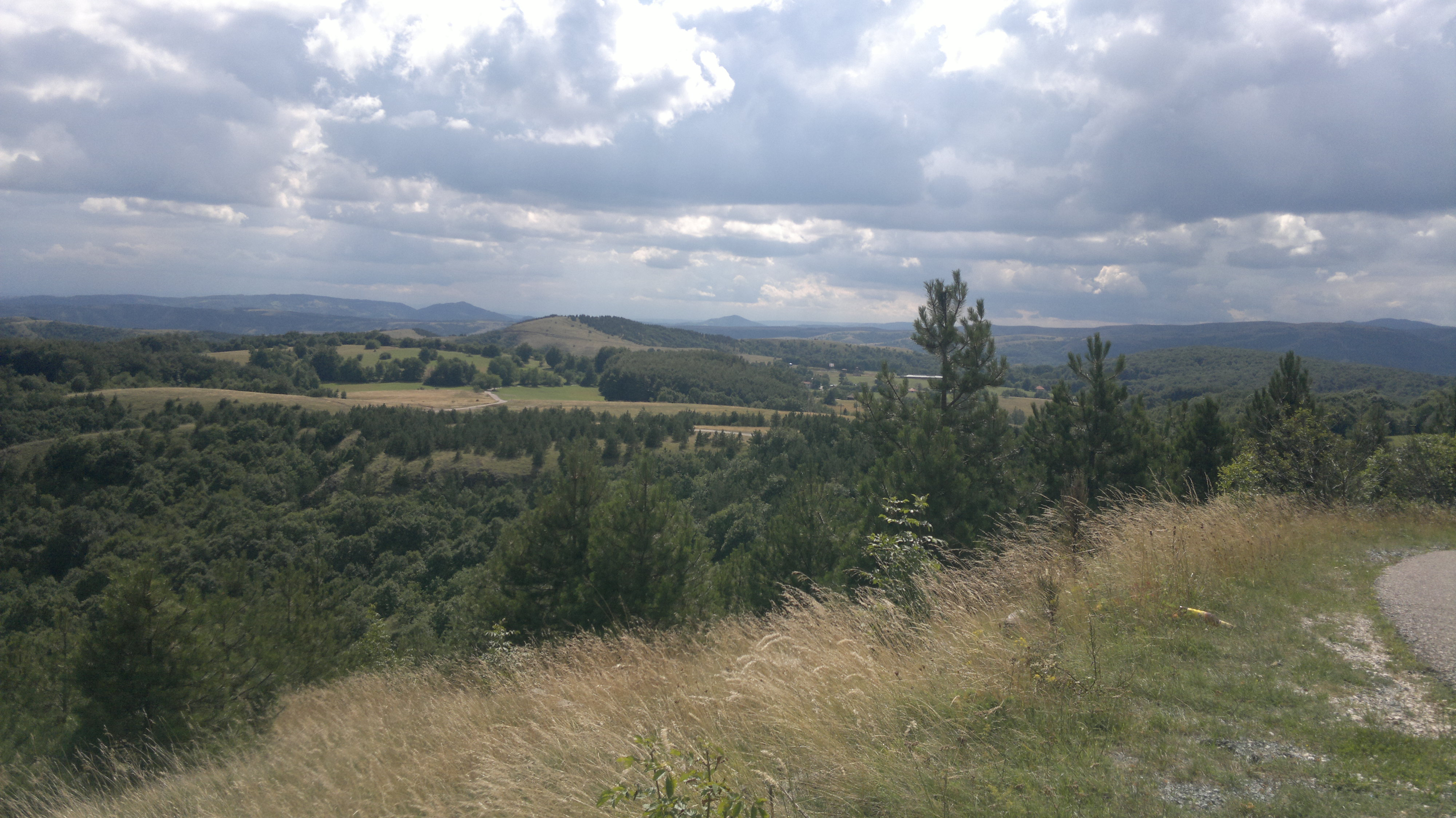 Panorama Ravne gore